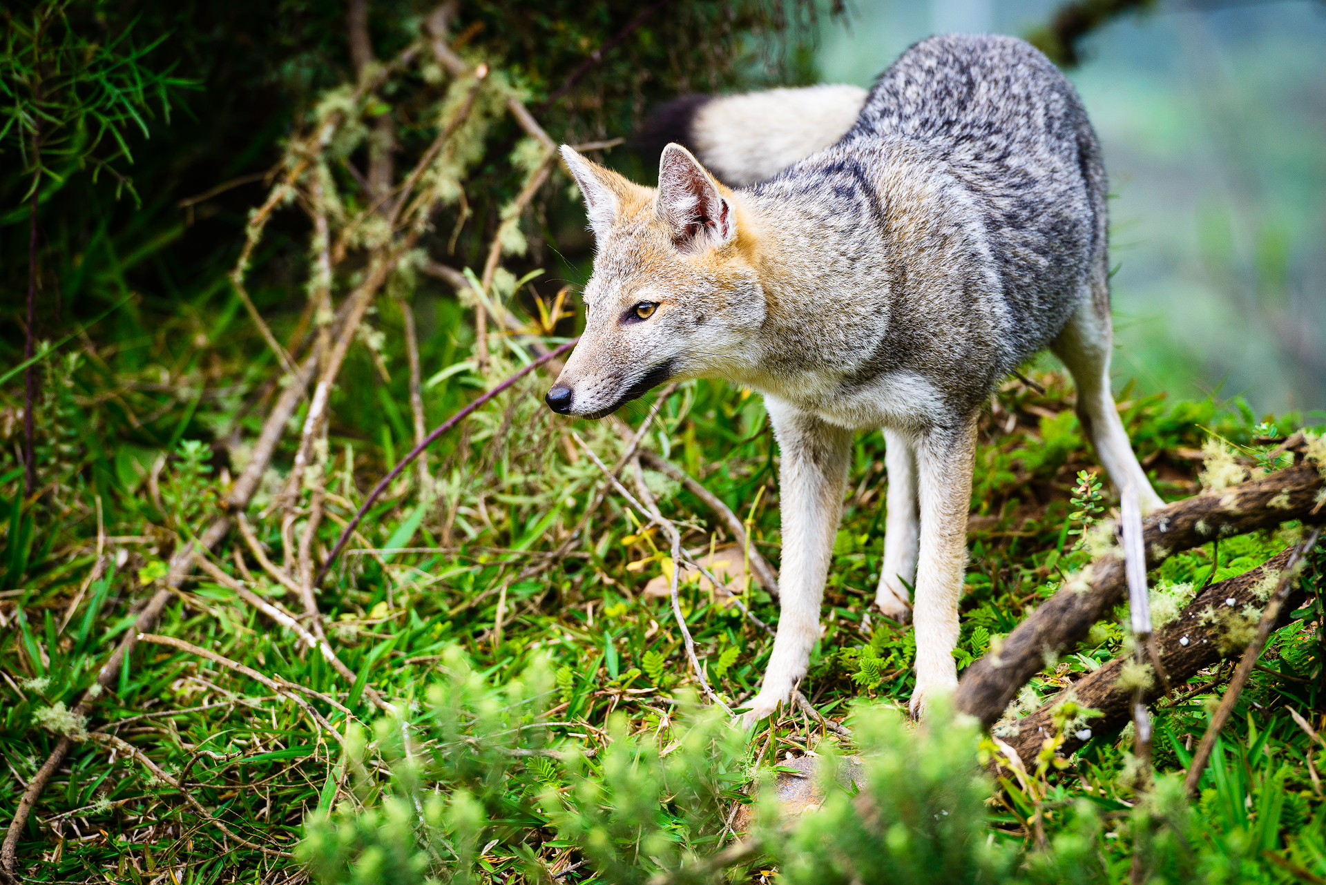 Graxaim ou Pampas Fox fazendo pose